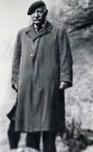 Ettore Felice Camerino